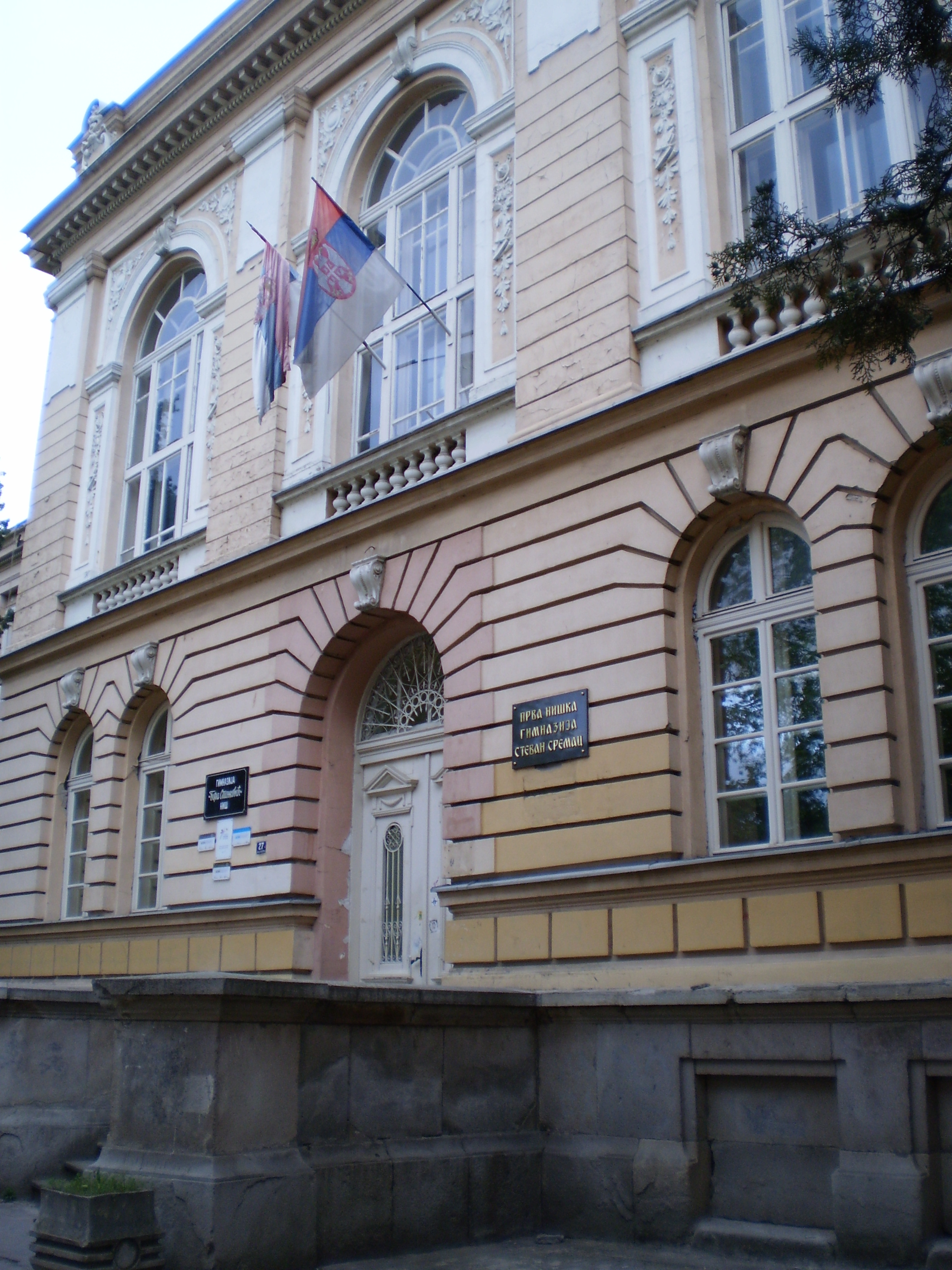 Srpski (latinica): Gimnazija Stevan Sremac u Nišu.